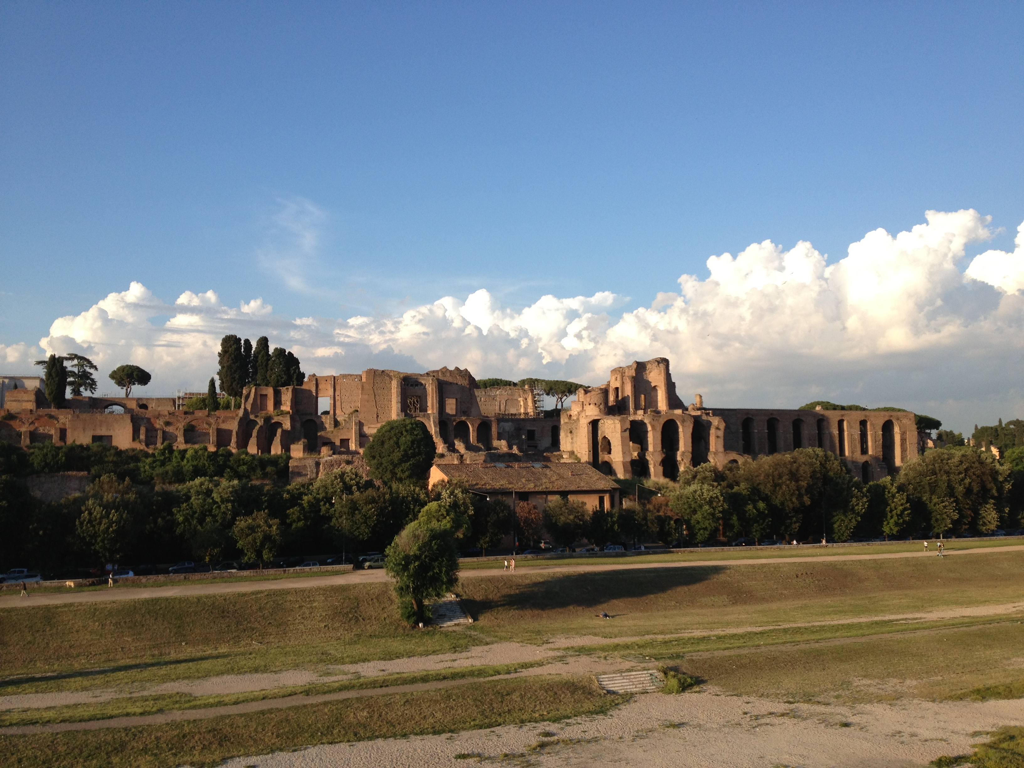 Vista della Domus Augustana dal Circo Massimo; Roma (Italia)